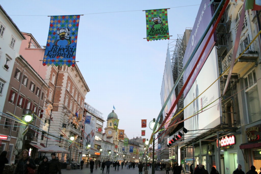 Riječki Korzo ukrašen tijekom mesopusta